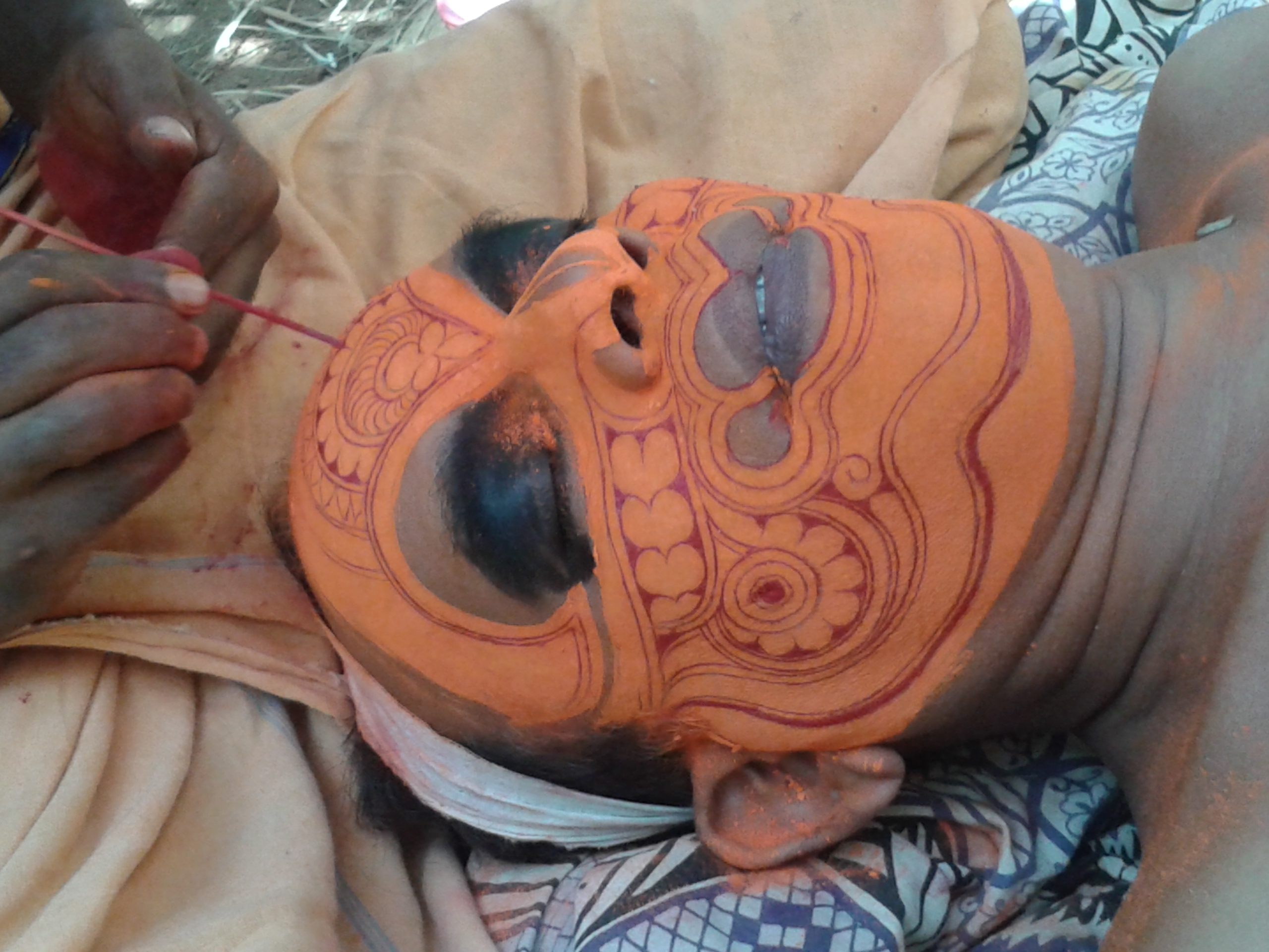 തെയ്യങ്ങൾക്ക് ഭാവവും വ്യത്യസ്തതയും നൽകുന്നത് മുഖതെഴുത്താണു. വിഷ്ണുമൂർത്തി/പരദേവത യുടെ മുഖത്തെഴുത്താണു ചിത്രത്തിൽ